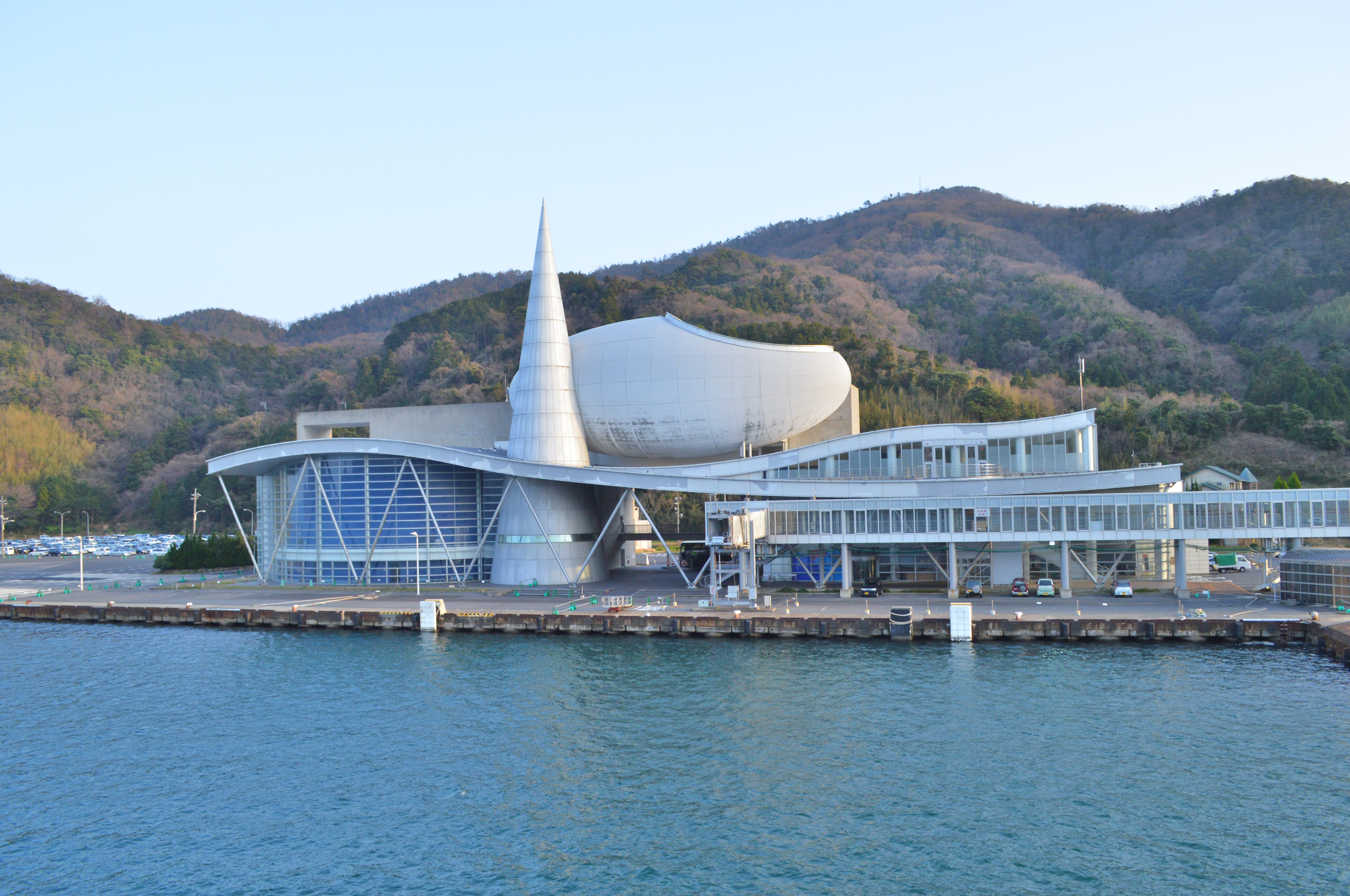 七類港ターミナルビル